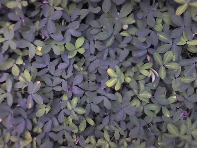 Arachis repens, grama-amendoim, handro